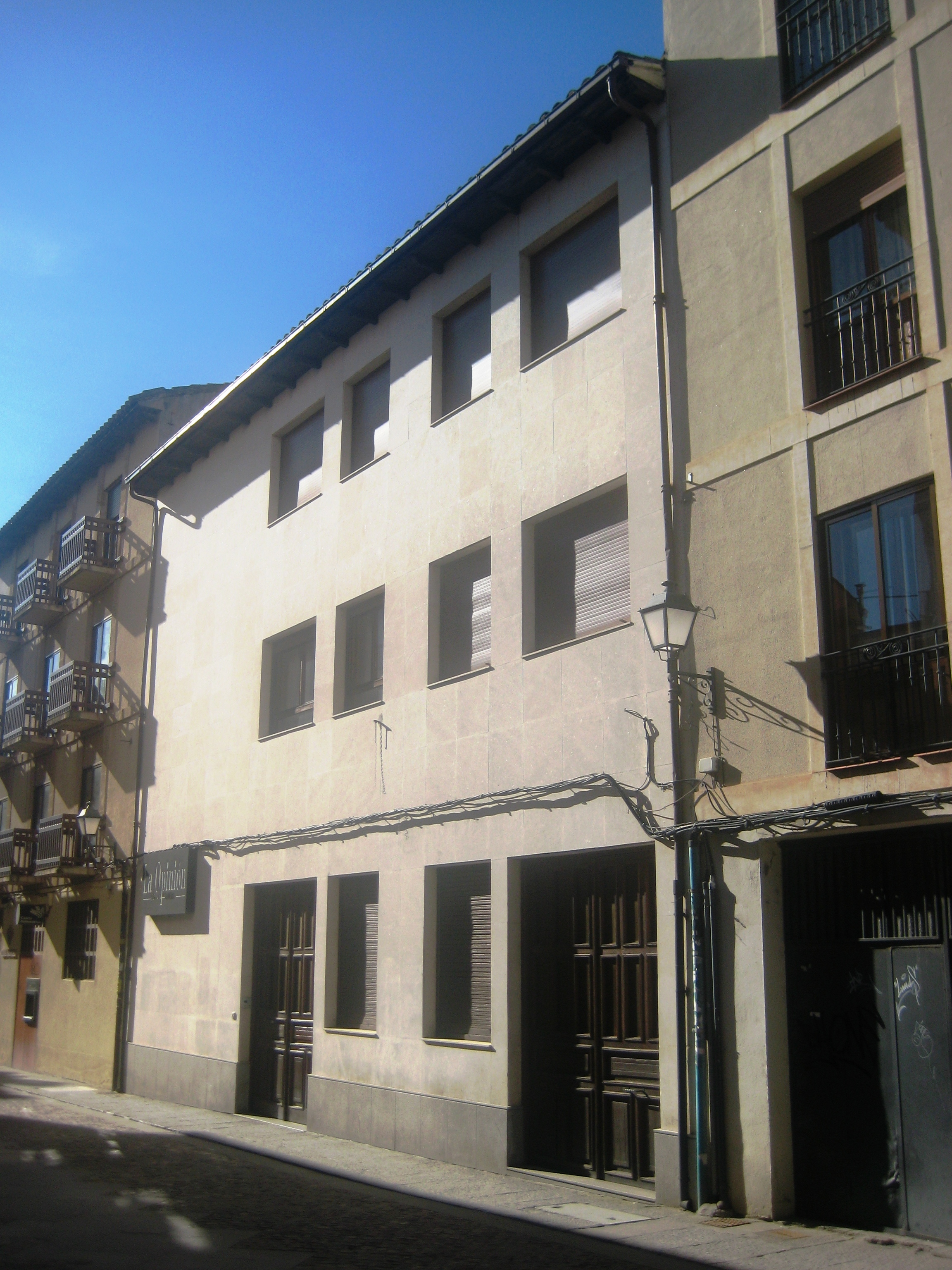 Sede del diario La Opinión-El Correo de Zamora